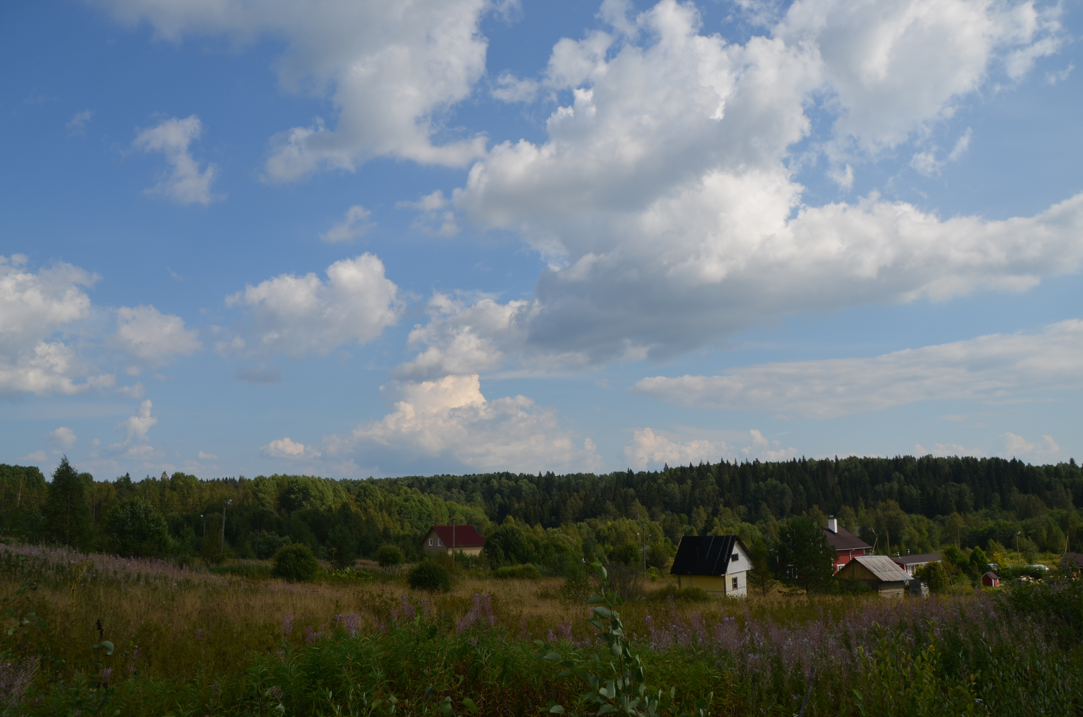 СНТ "Приречное". Начало